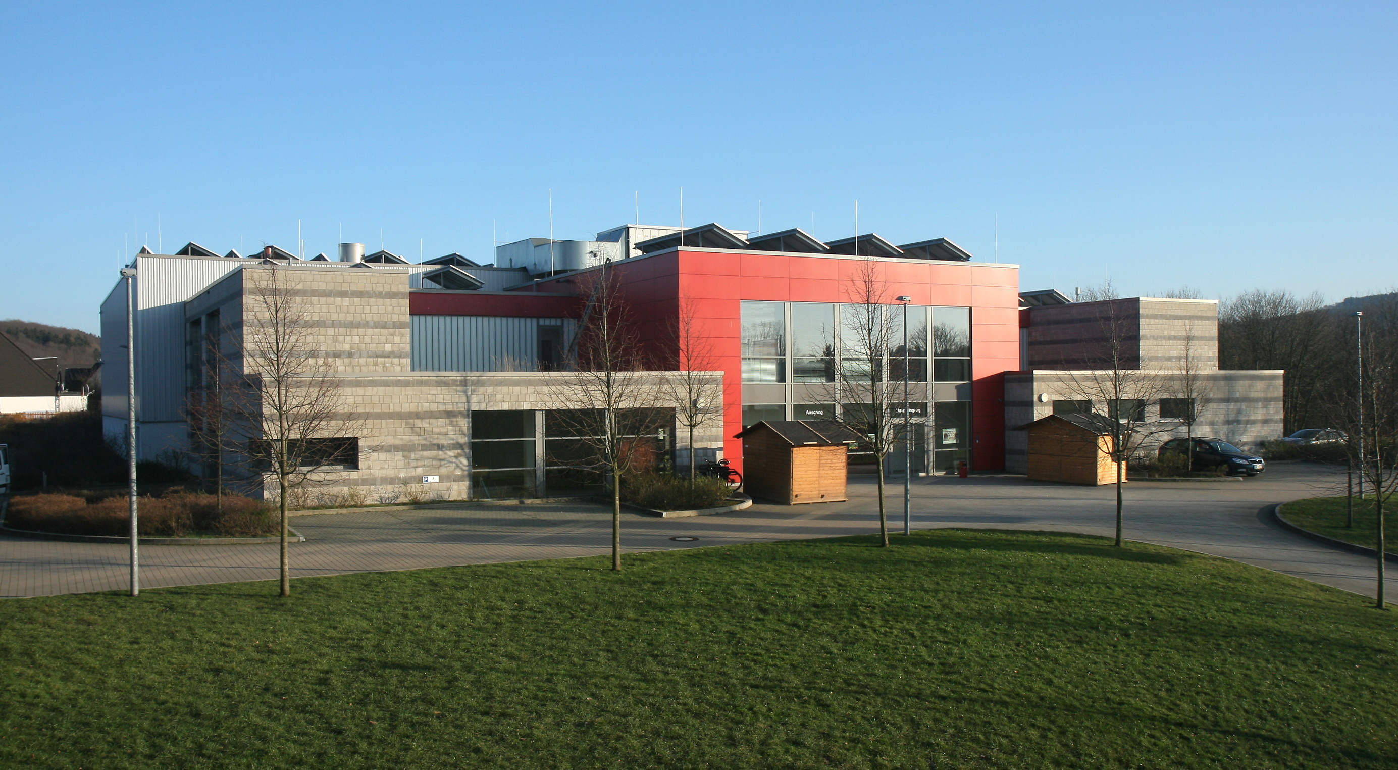 Matthias-Grothe-Halle, Alexander-Pfänder-Weg 7-9 in Iserlohn.